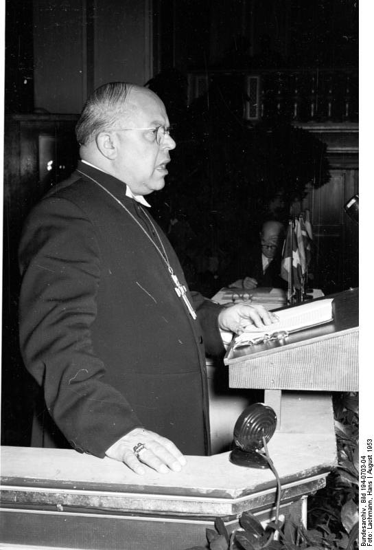 CVJM Kassel